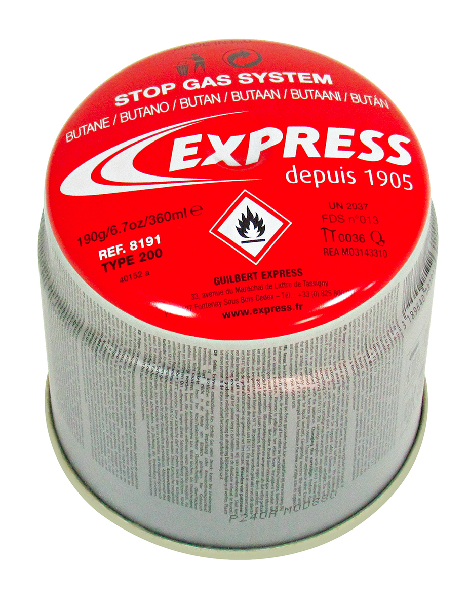 Cartouche de gaz sécurisée Réf. 8191 de Guilbert Express en standard S200.